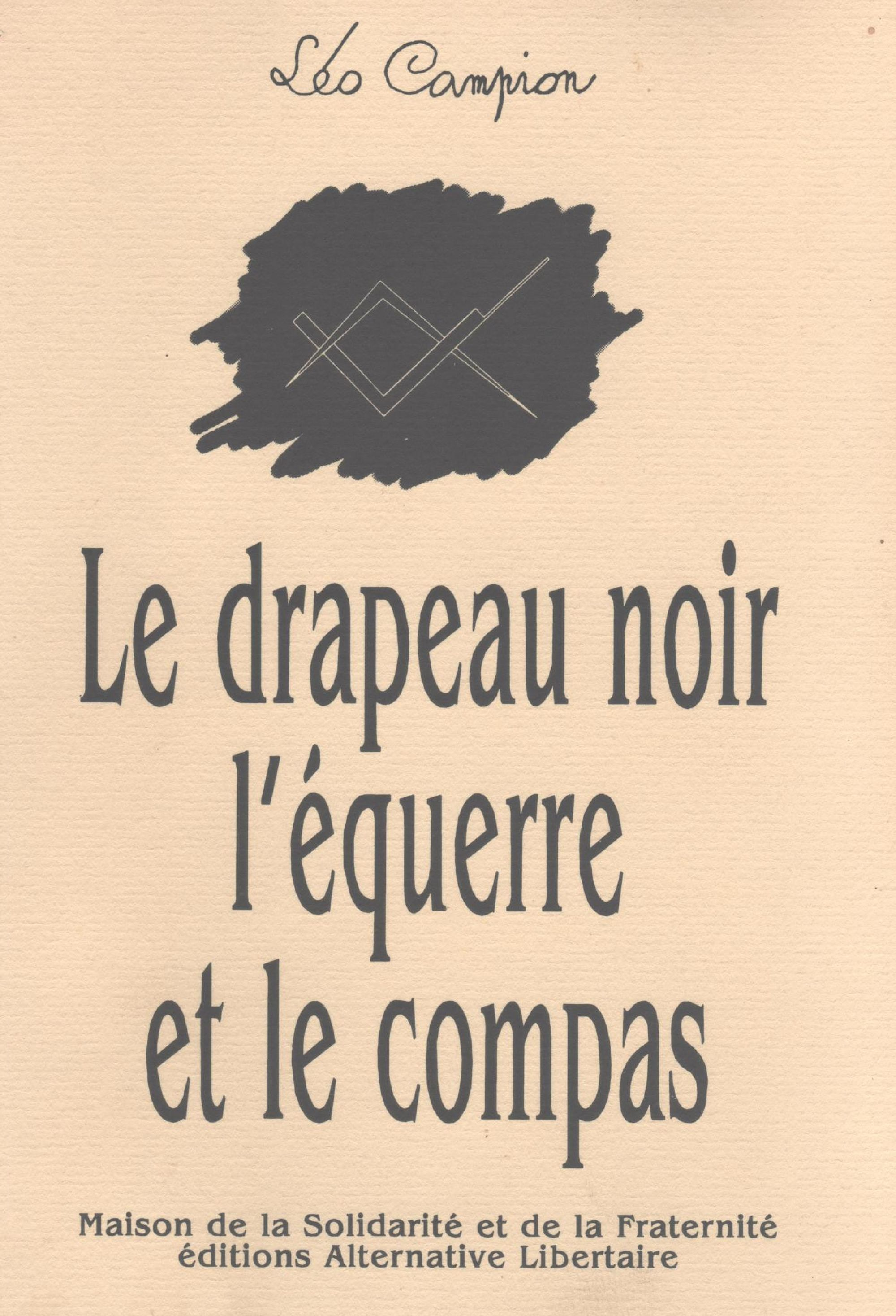 Couverture de l'édition de 1996 du livre de Léo Campion : Le drapeau noire l'équerre et le compas. Cette image ou le texte qui y est représenté est seulement composé de formes géométriques simples et de texte. Elle n’atteint pas le seuil d'originalité nécessaire pour la protection du droit d’auteur, et est donc du domaine public.